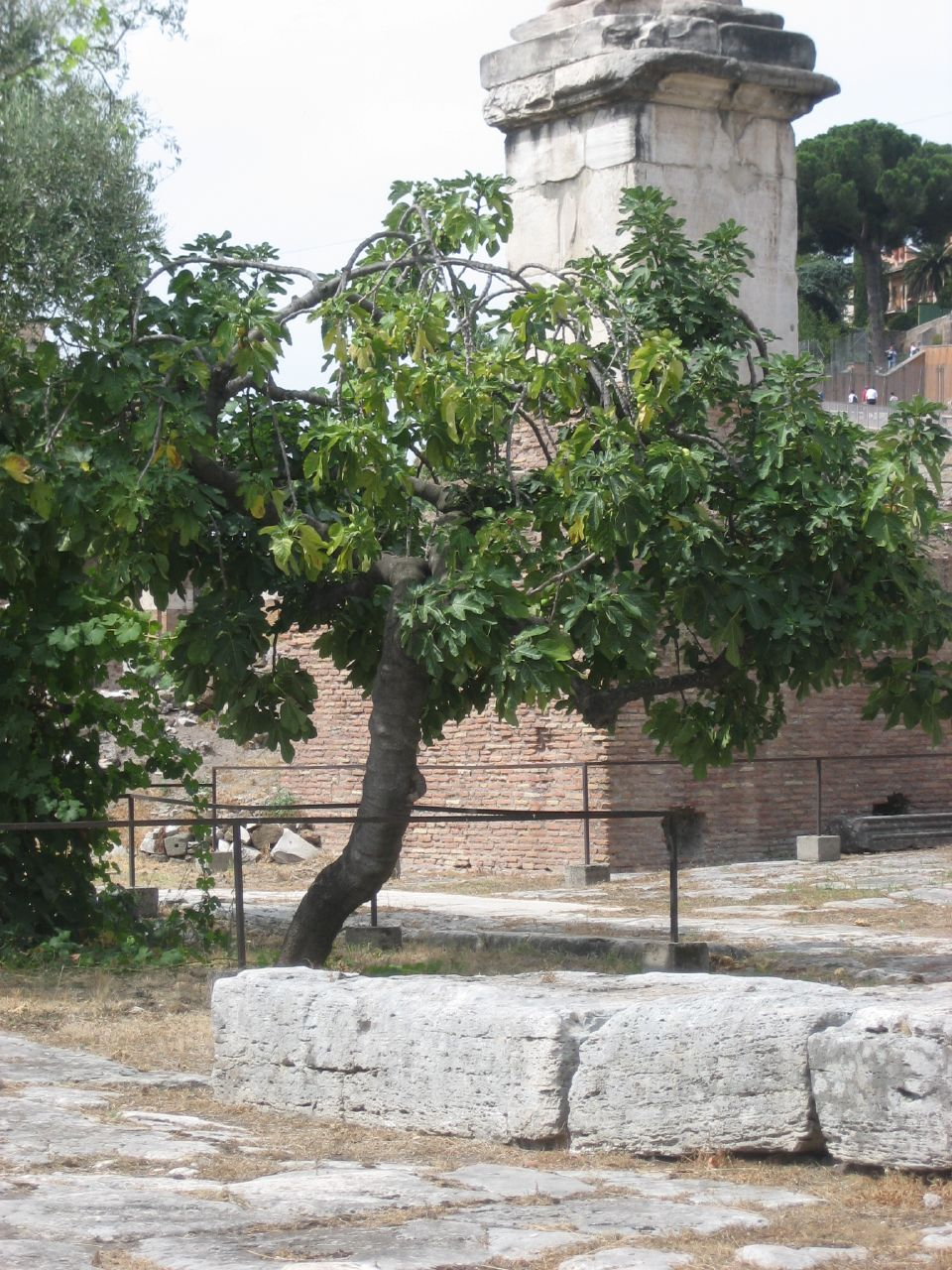 Figuier sauvage à l'entré de la grotte du Lupercal